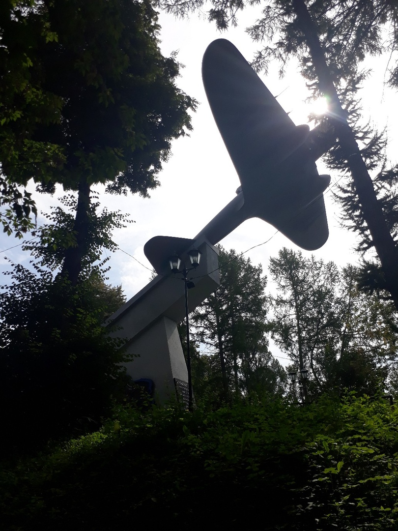 Ил 2